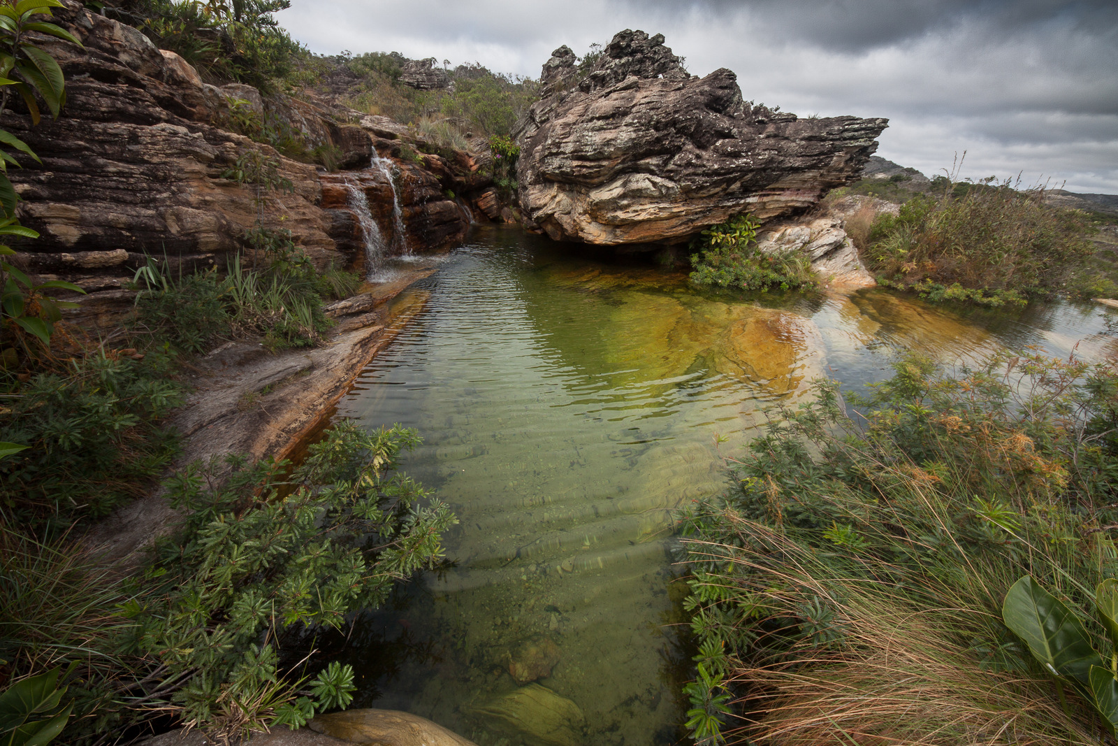 Parque Estadual do Biribiiri em Diamantina MG